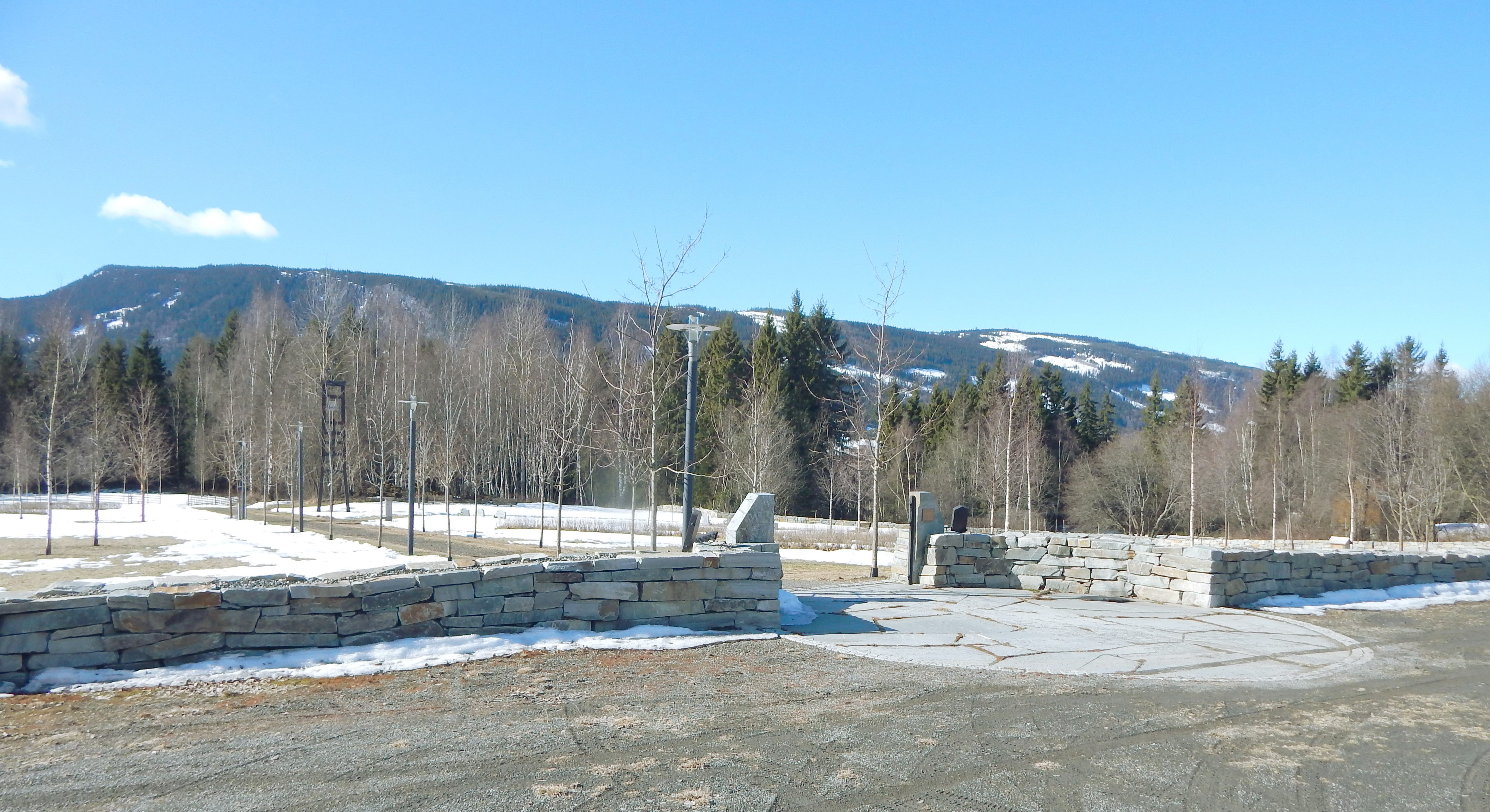 Bruvin gravlund i Øyer